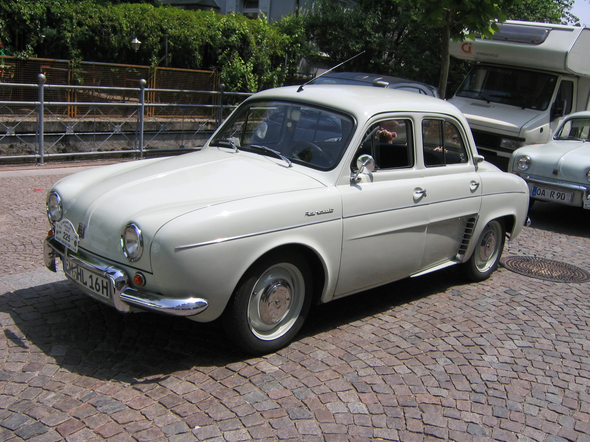 aufgenommen während eines Oldtimer-Treffens im Emmendingen, Deutschland